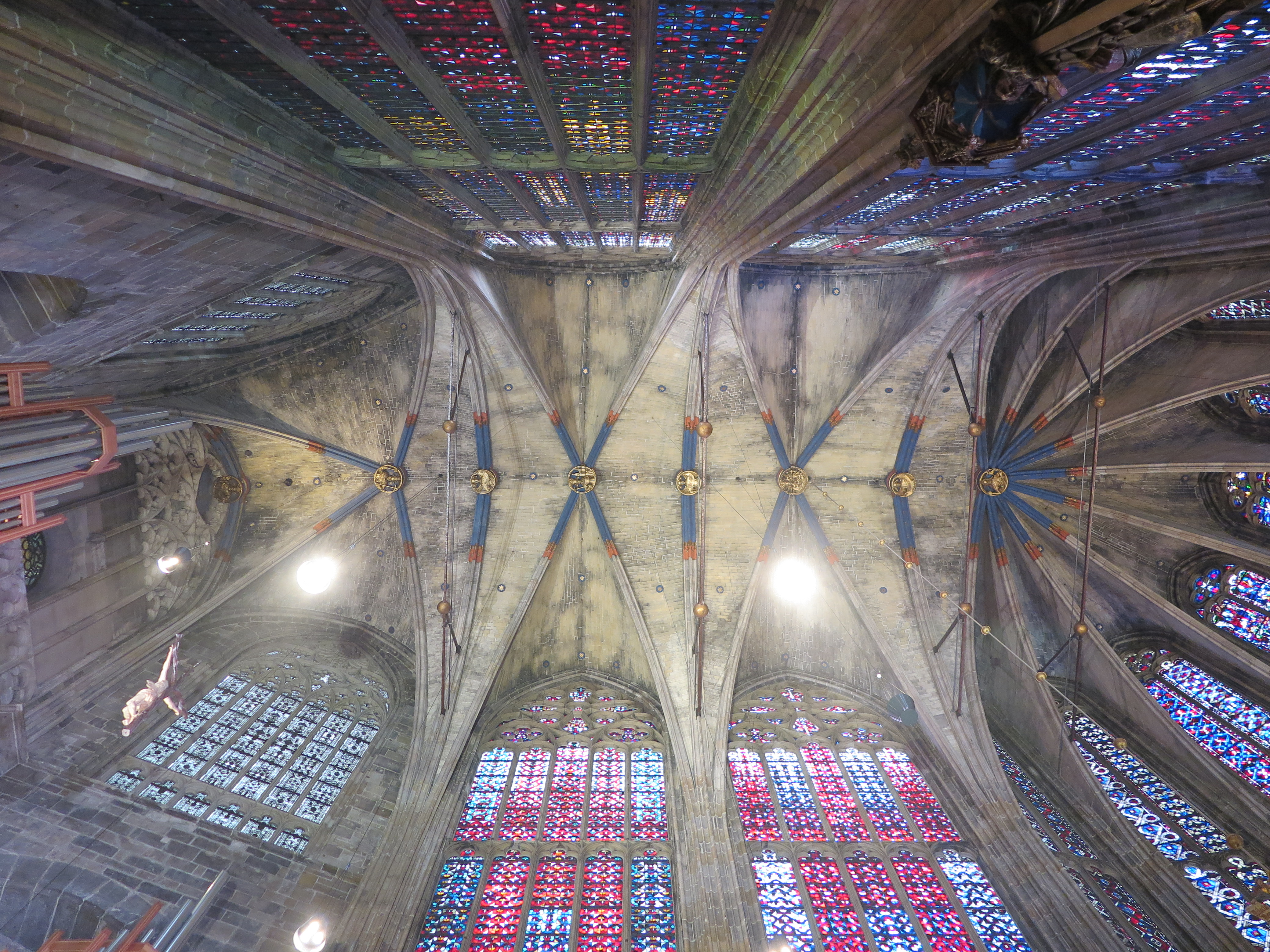 Das Kreuzrippengewölbe der Chorhalle des Aachener Doms.